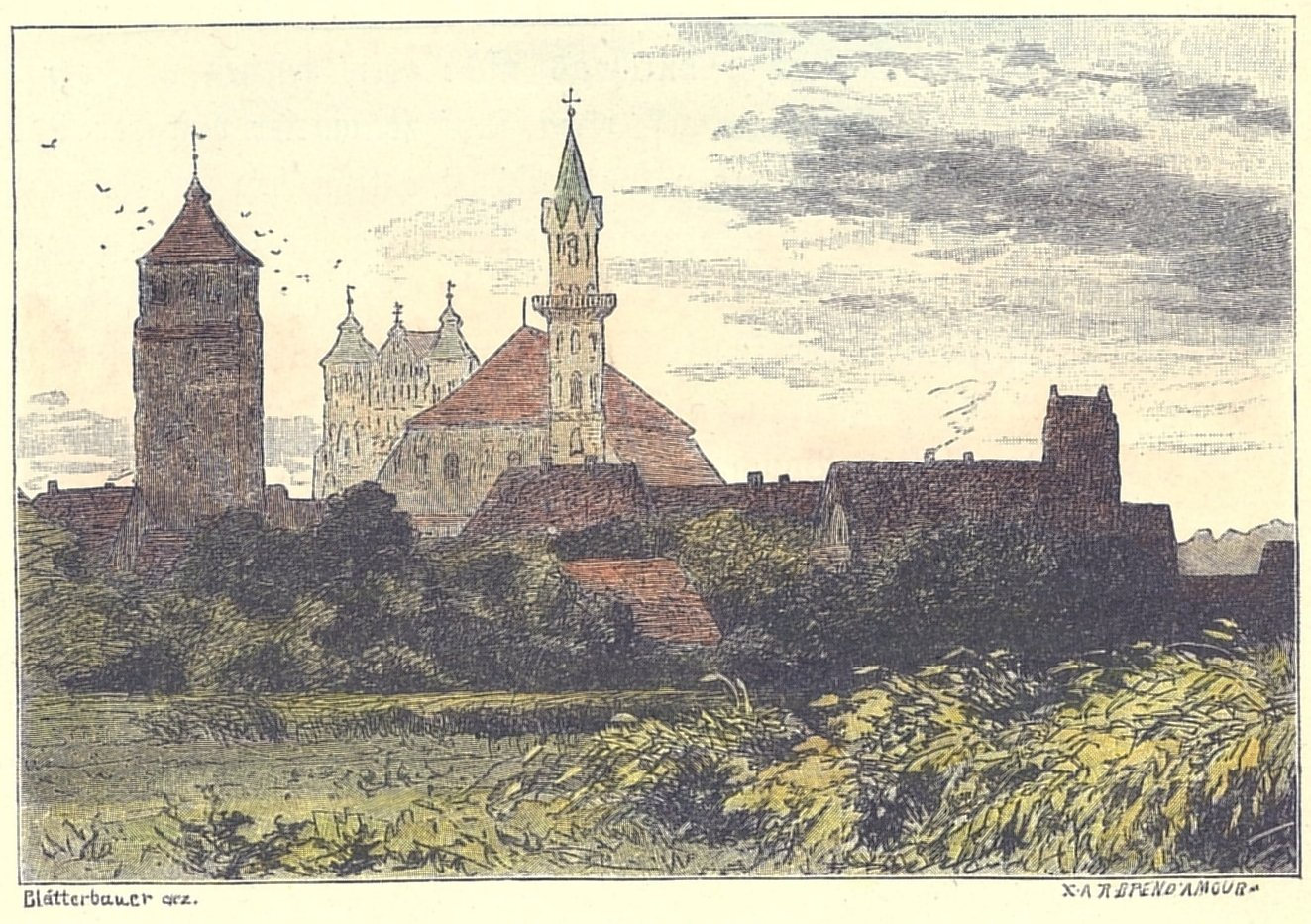 Góra na Dolnym Śląsku